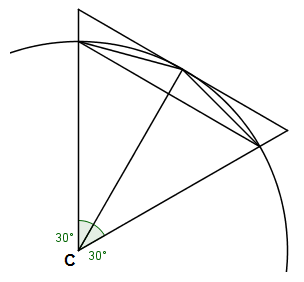 Diagrama usado para cálculo do valor do número pi. Desenhado no GeoGebra.